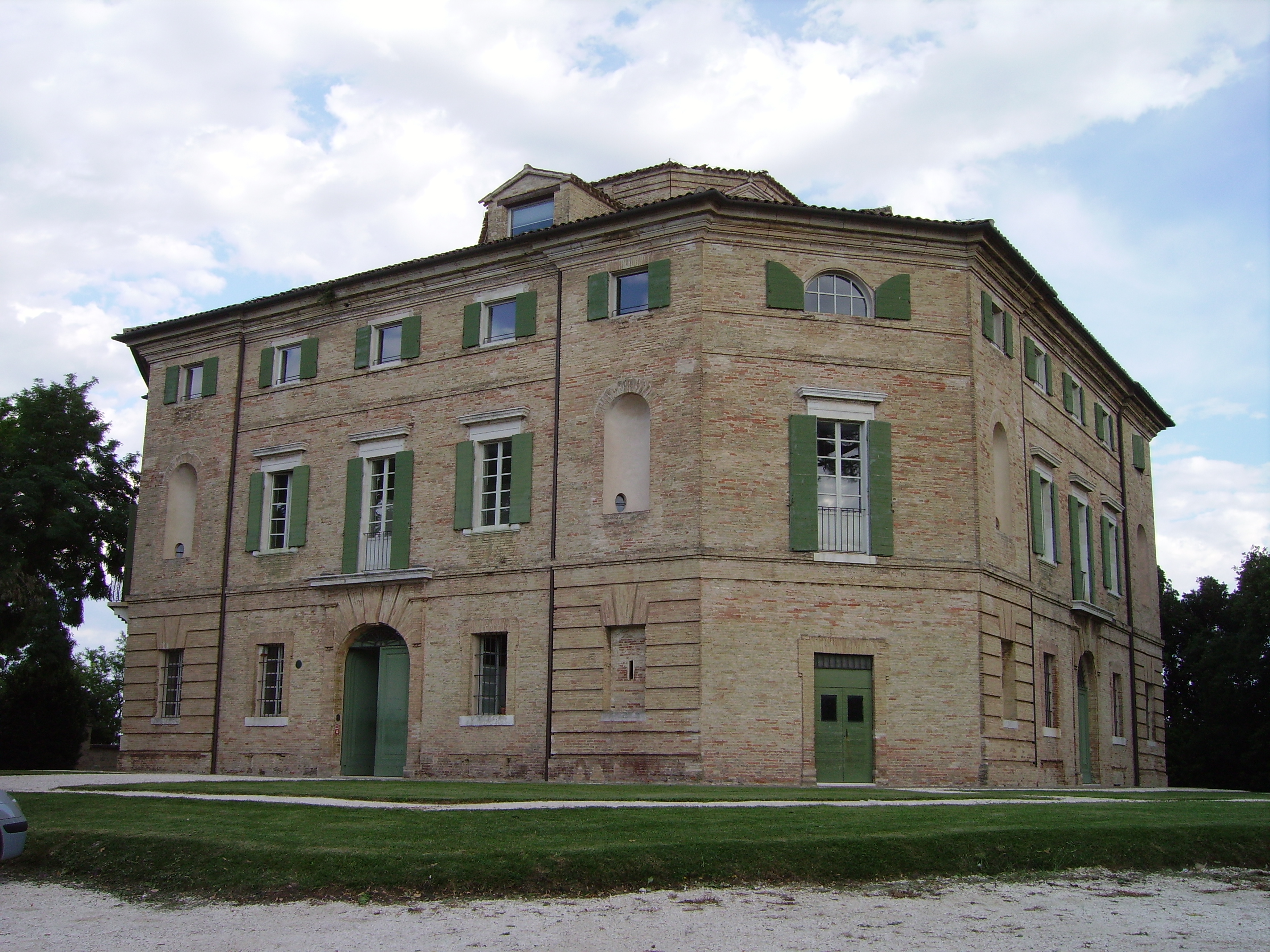 Villa Favorita ad Ancona, attuale sede dell'ISTAO